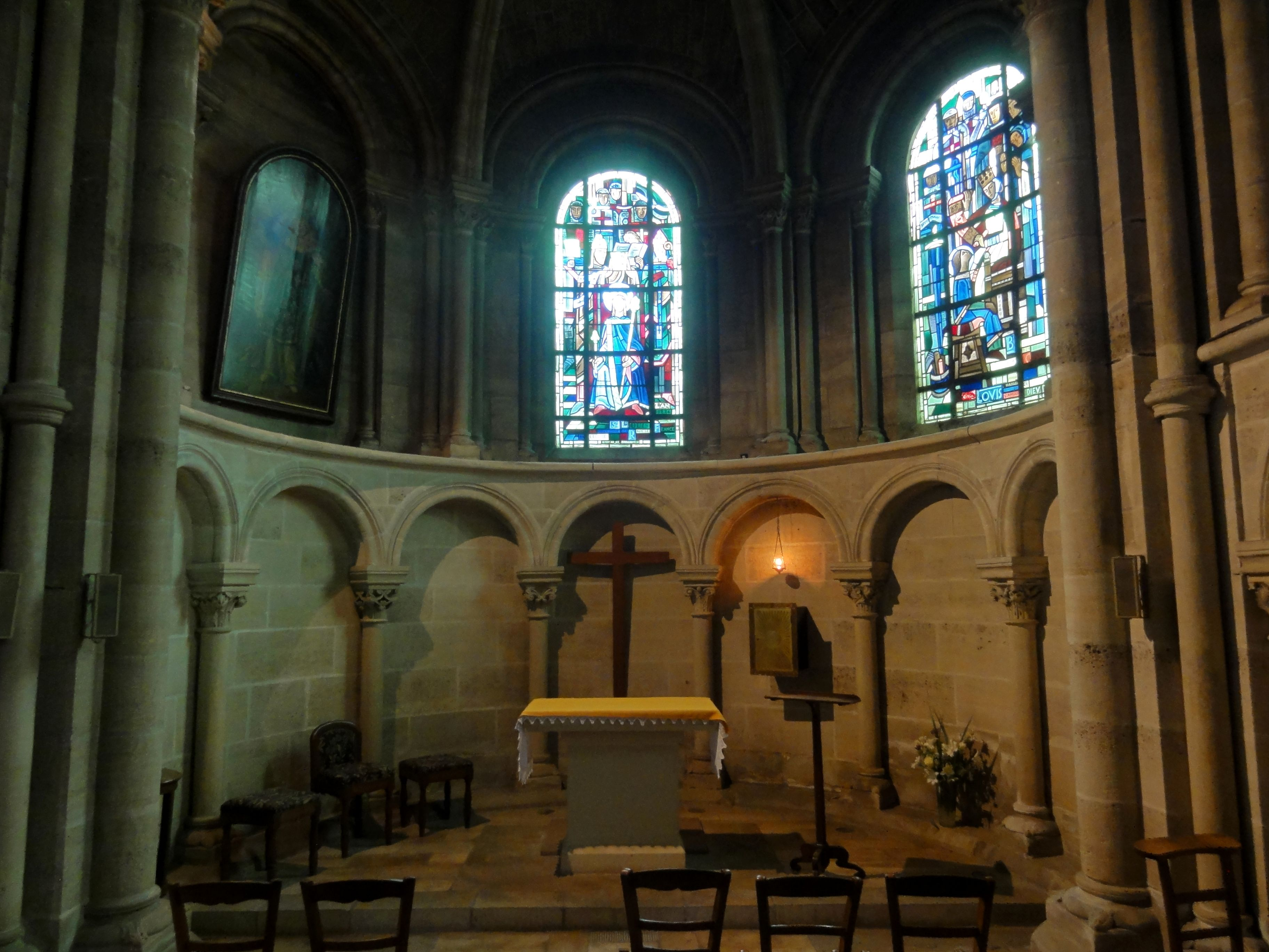 Abside de la chapelle Saint-Louis (chapelle au sud du déambulatoire).